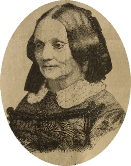 Marie-Julienne-Elisa Grimailh, devenue après son mariage Élisa Lemonnier (née le 24 mars 1805 à Sorèze et morte le 5 juin 1865 (à 60 ans) à Paris) est une éducatrice française, considérée comme la fondatrice de l’enseignement professionnel pour les femmes.